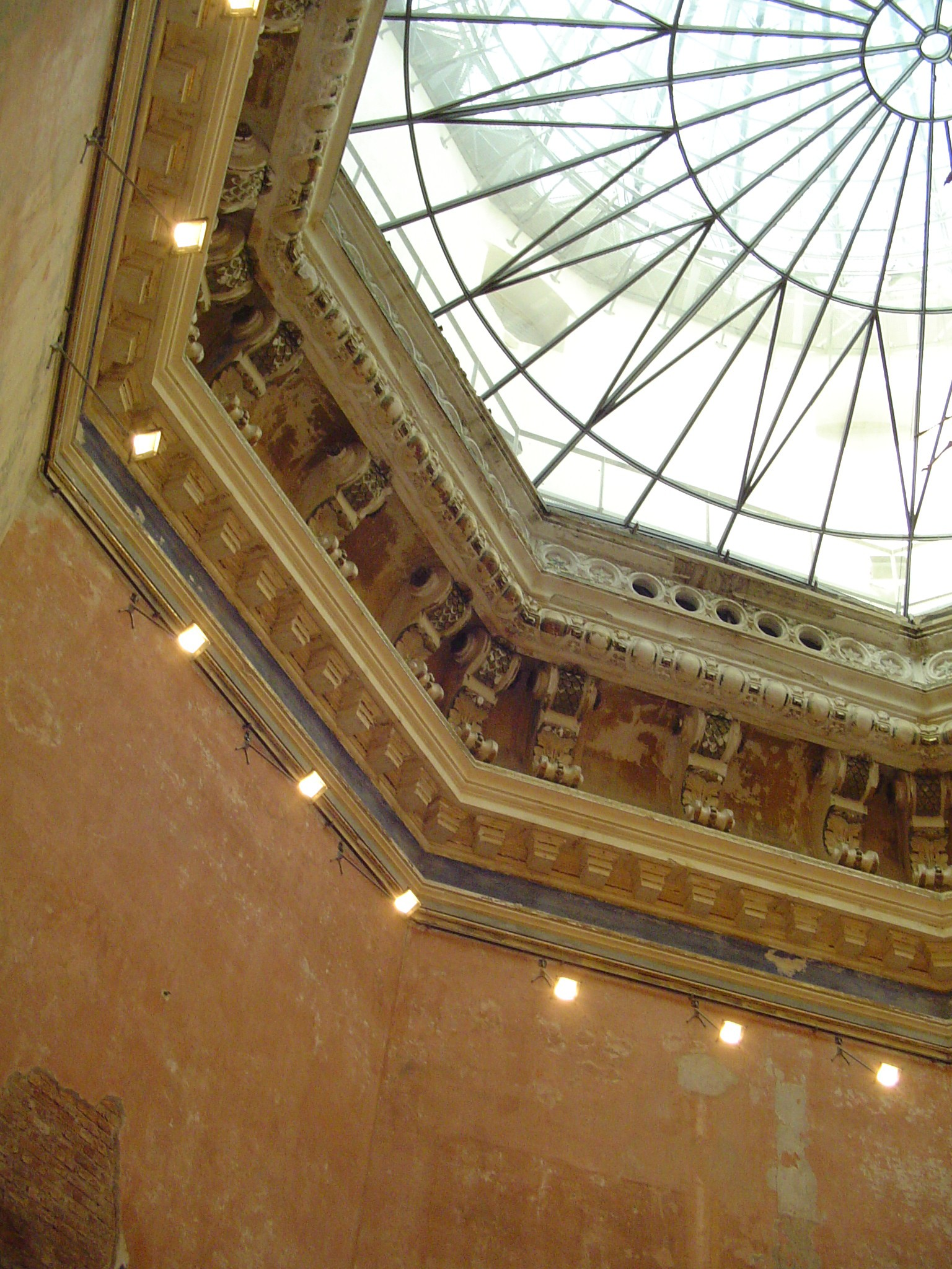 Innenansicht der Dresdner Kunstakademie